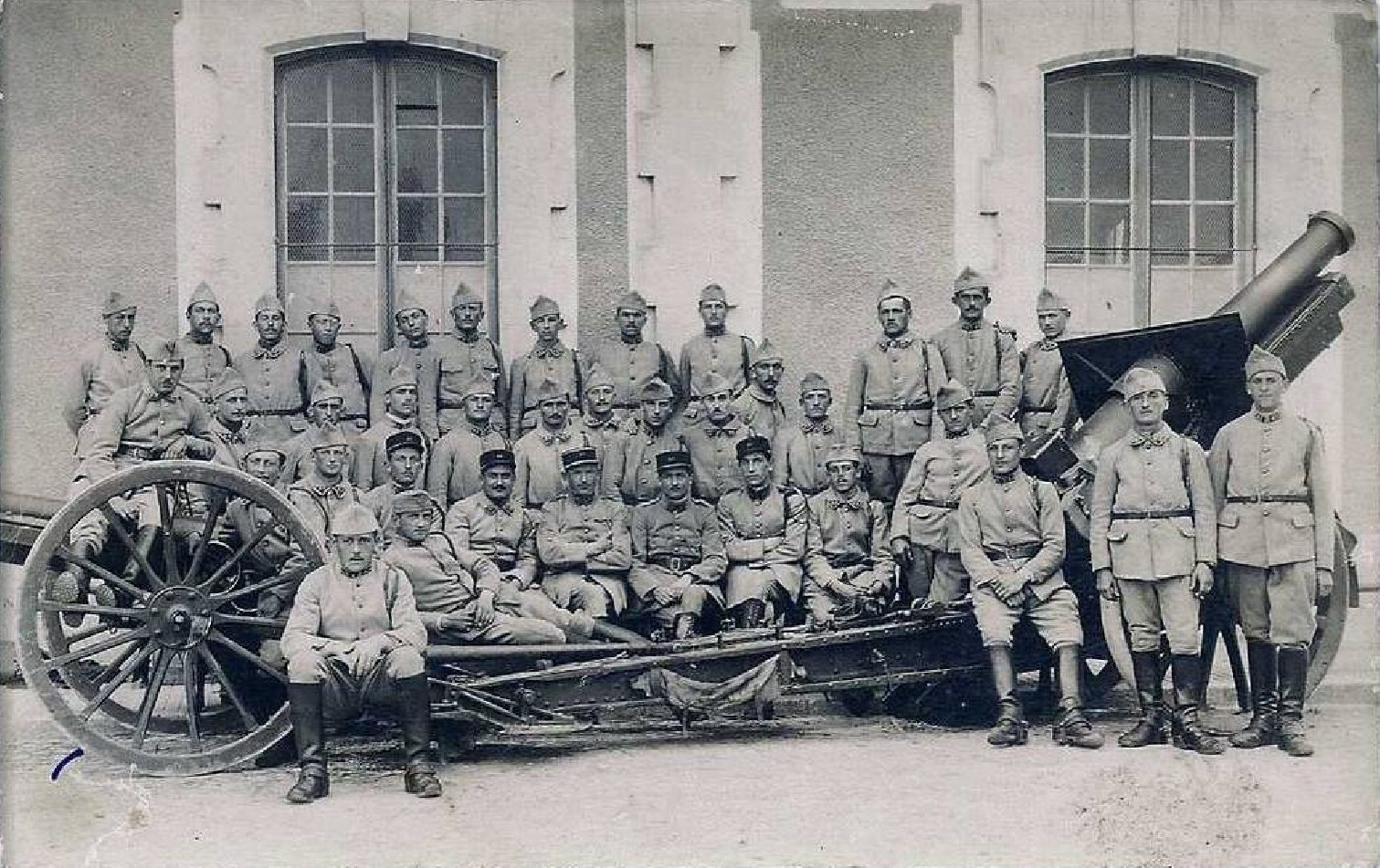 Groupe du 43e RAD, Caen, Quartier Claude Decaen, fin des années 1930 avec à gauche un canon de 75 modèle 1897 et à droite un 155C Schneider